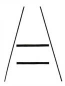 Optical illusion - parallel lines